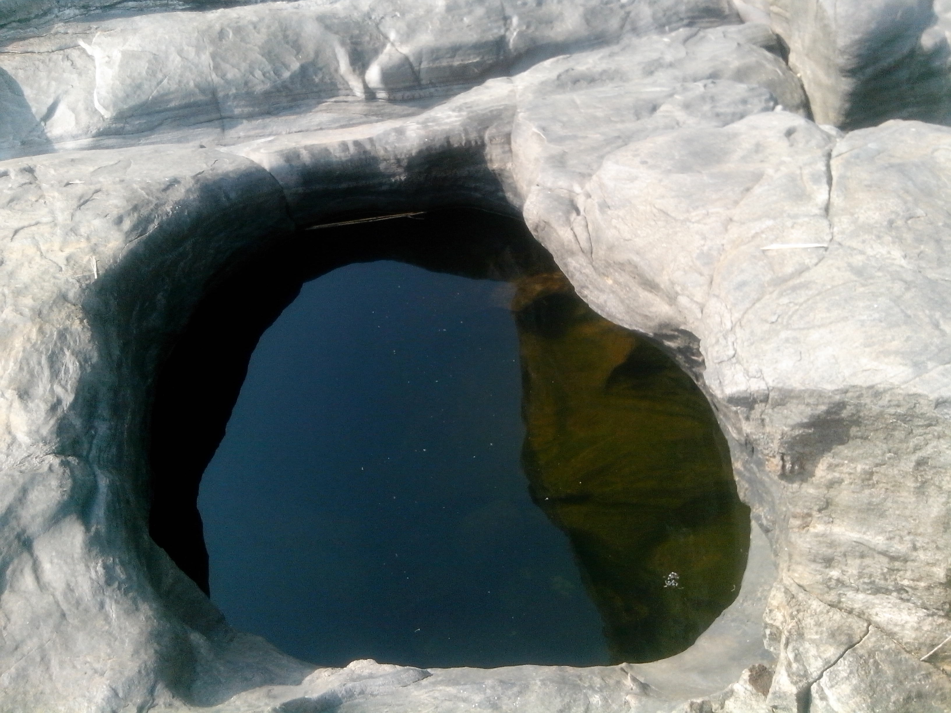 stone made pit